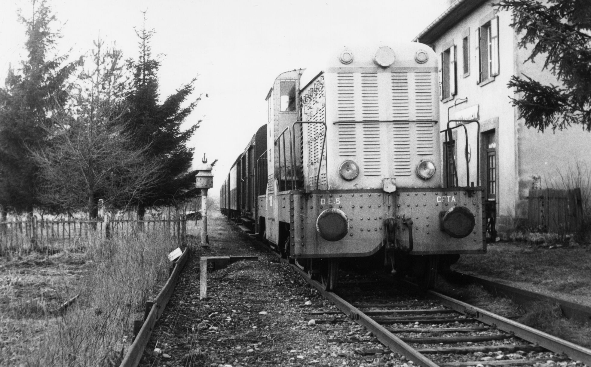 Locotracteur DE5 des CFTA de Gray en gare de Guewenheim (68) 1979